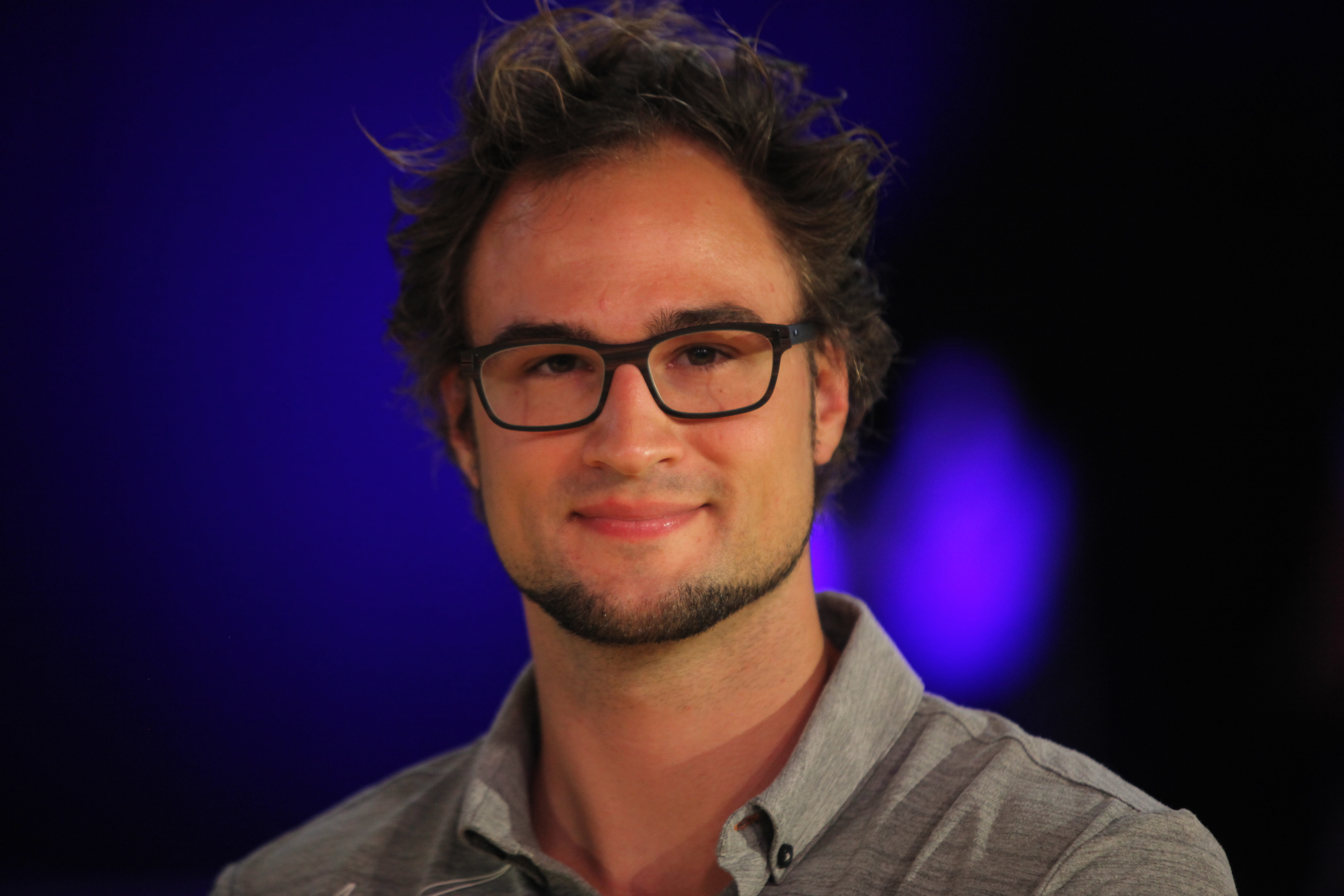 Der Zehnkämpfer Jan Felix Knobel bei der Podiumsdiskussion Sport im Dialog: Hoch hinaus - Spitzensport zwischen Rhein, Main und Neckar des Handballleistungszentrums Bergstraße beim Hessentag 2014 in Bensheim.